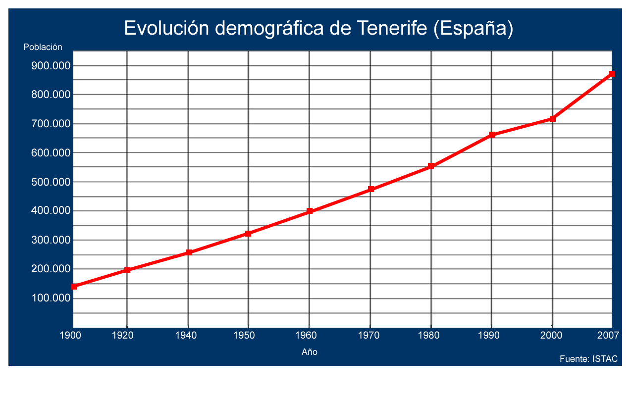 Evolución demográfica de Tenerife